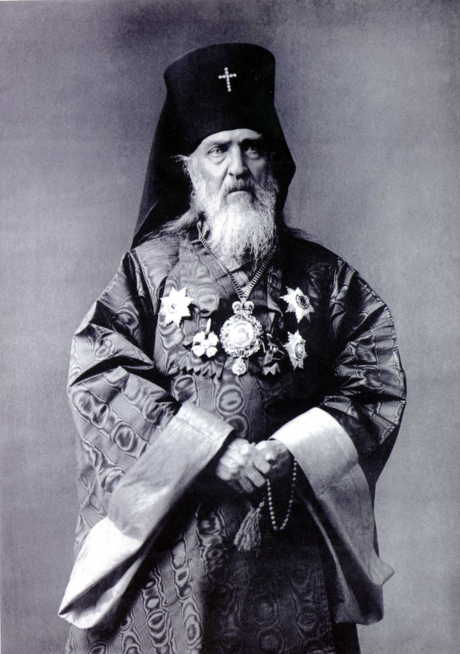 Святой равноапостольный Николай, архиепископ Японский